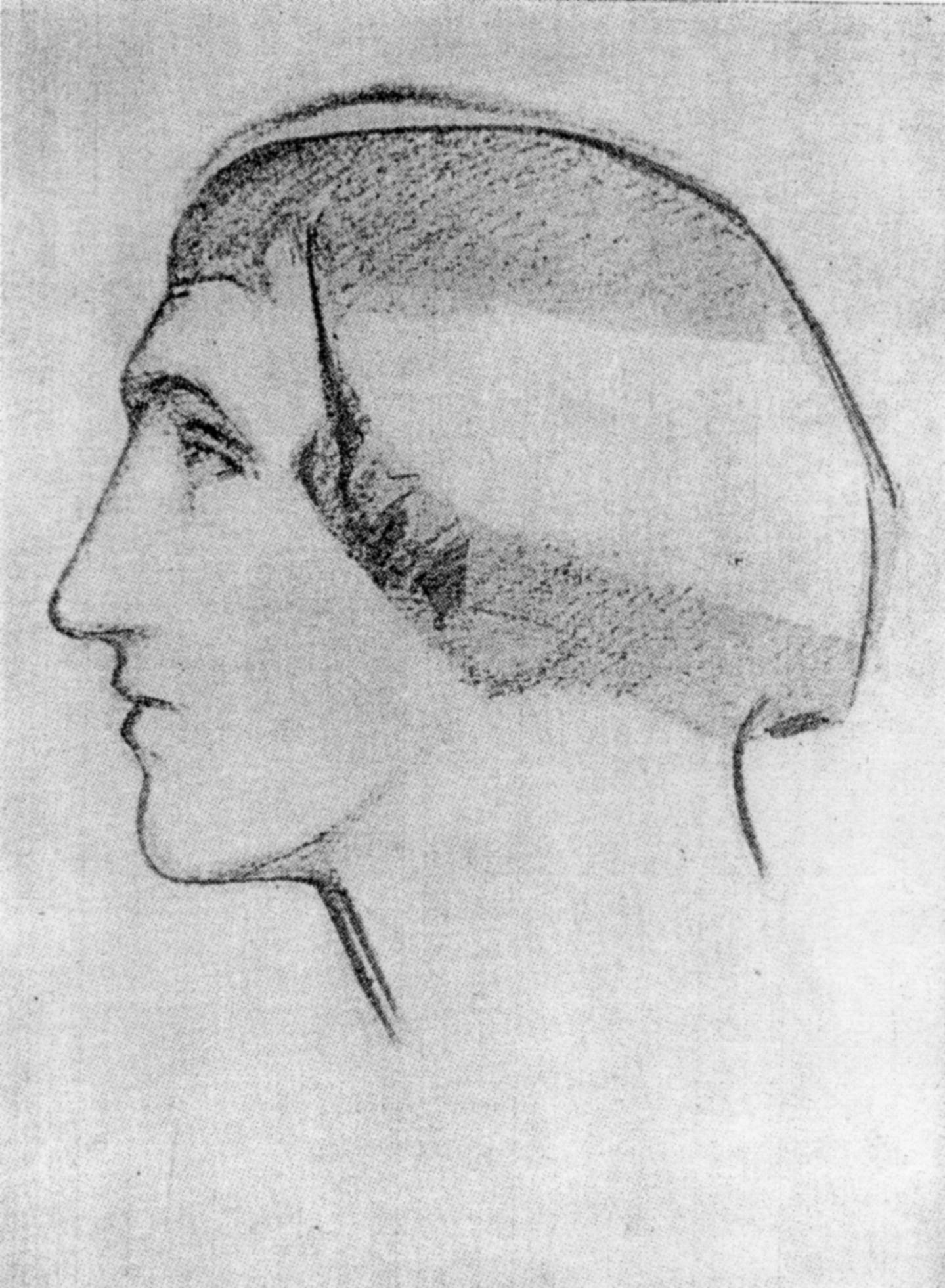 А. К. Шервашидзе. Портрет Н. Н. Евреинова.